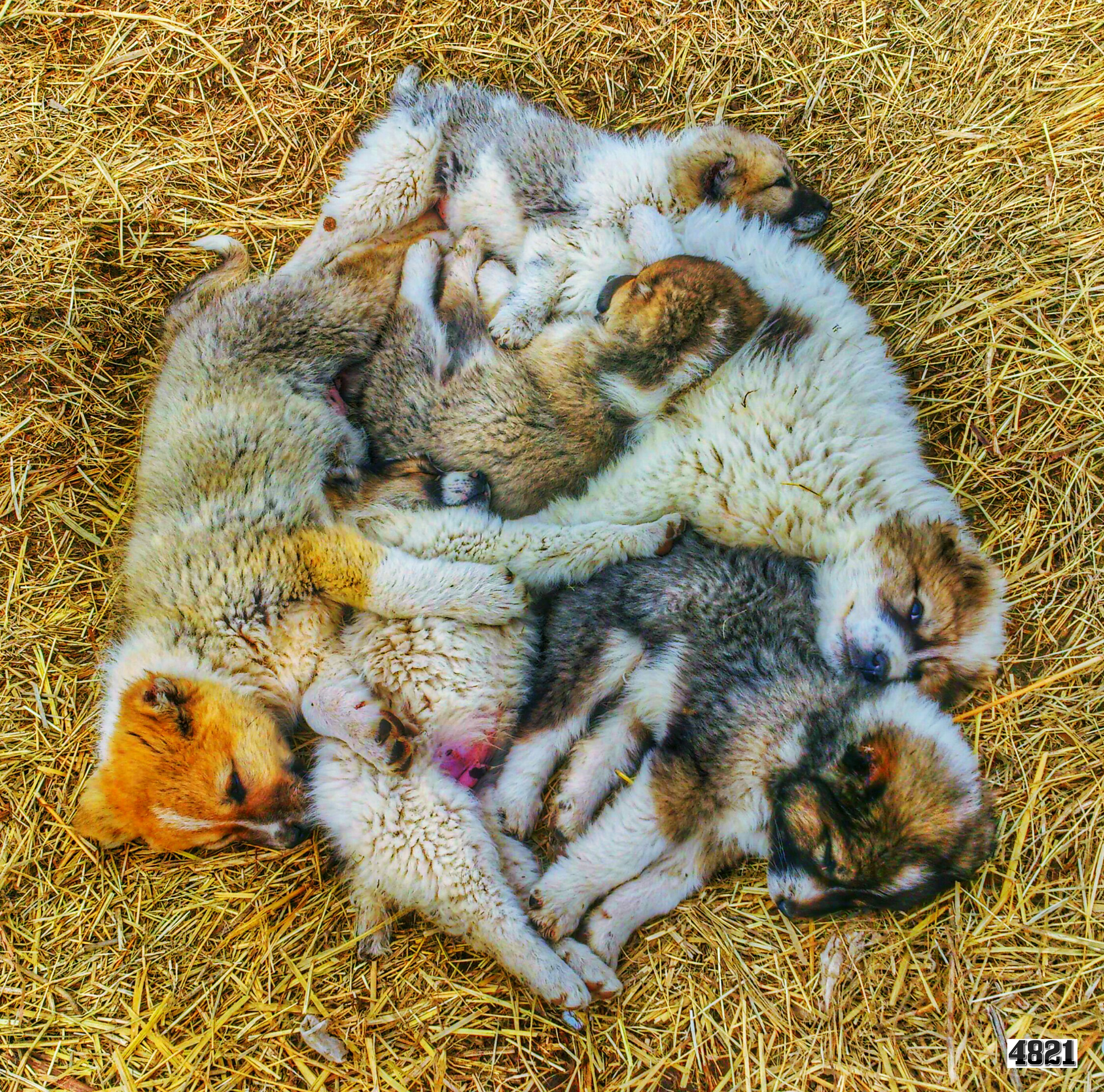 kopekler